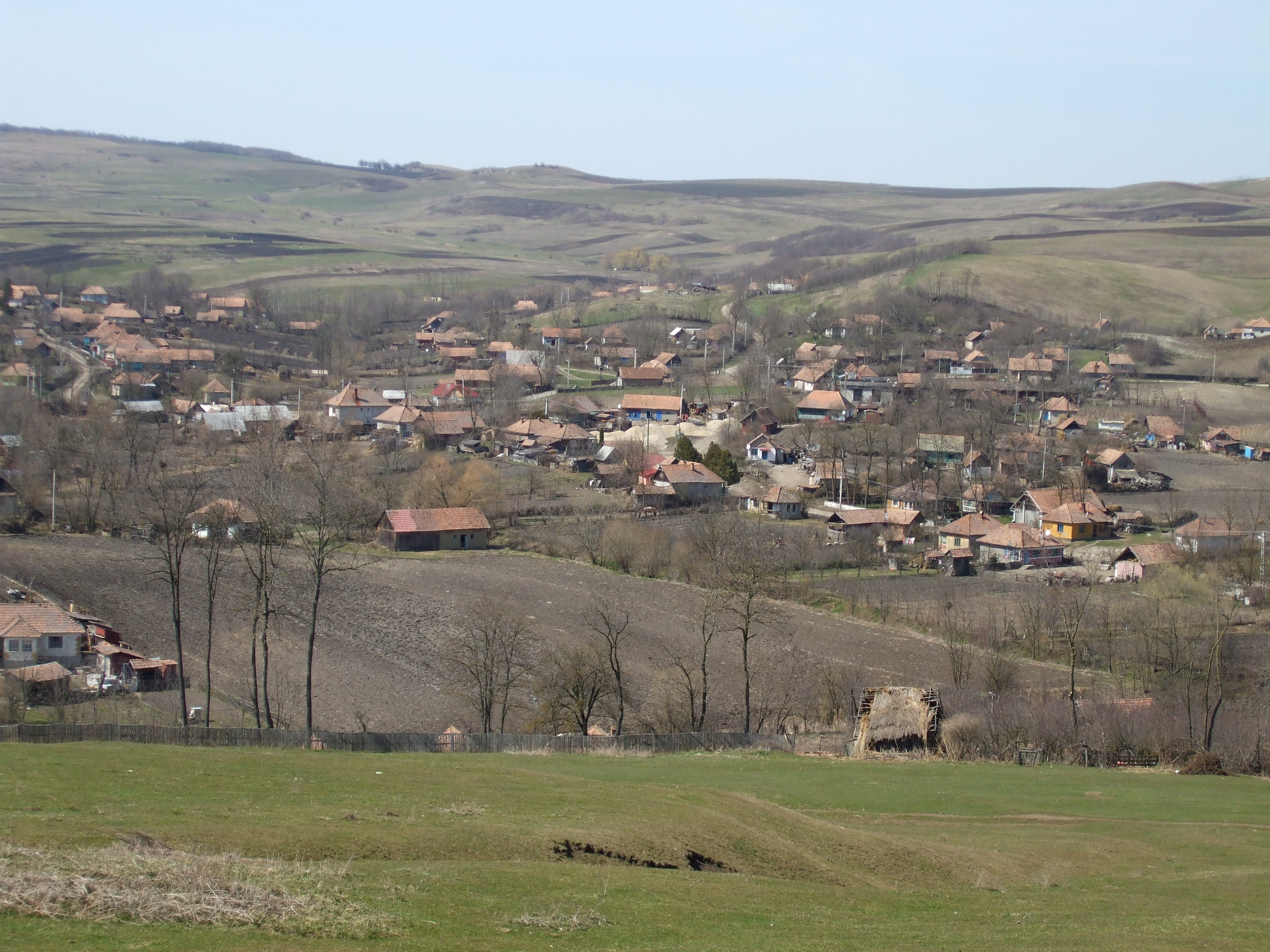 Imagini din Aruncuta,Cluj